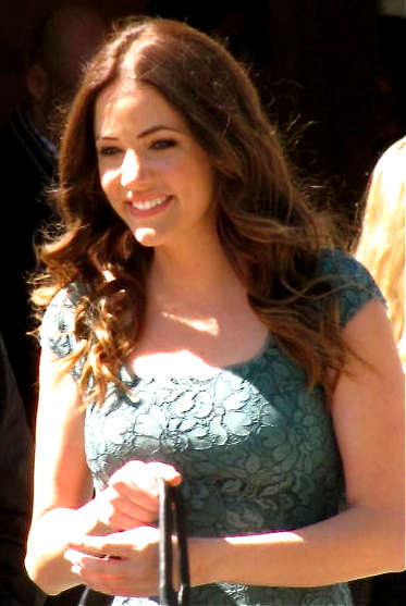 Julie Gonzalo in March 10, 2013